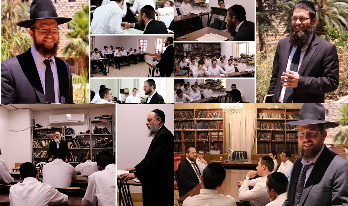 רבני ישיבת איתרי